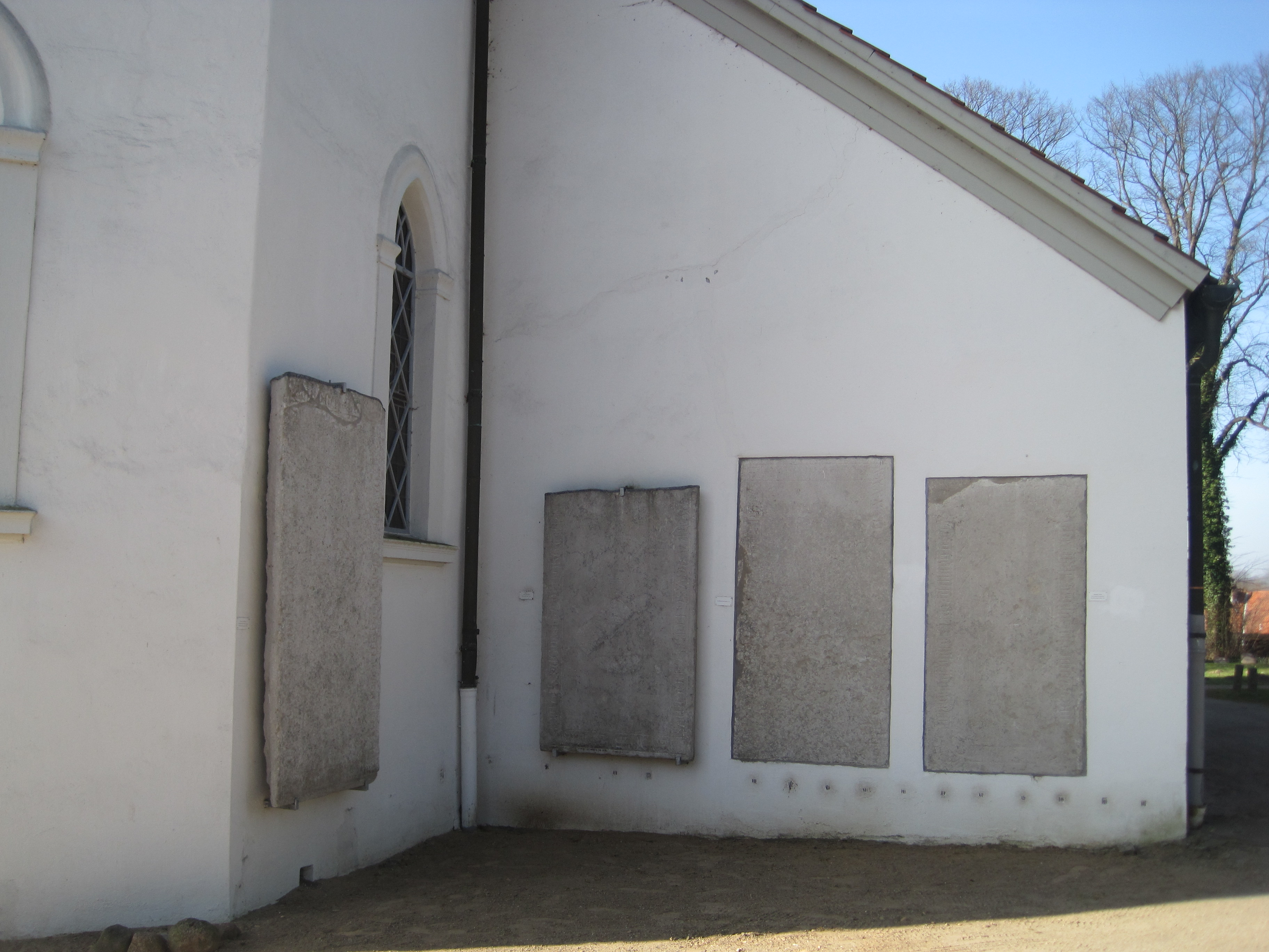 Matthias-Claudius-Kirche in Reinfeld (Holstein). Grabplatten aus der ehemaligen Klosterkirche an der Nordseite. Nördliche Halle von Osten.